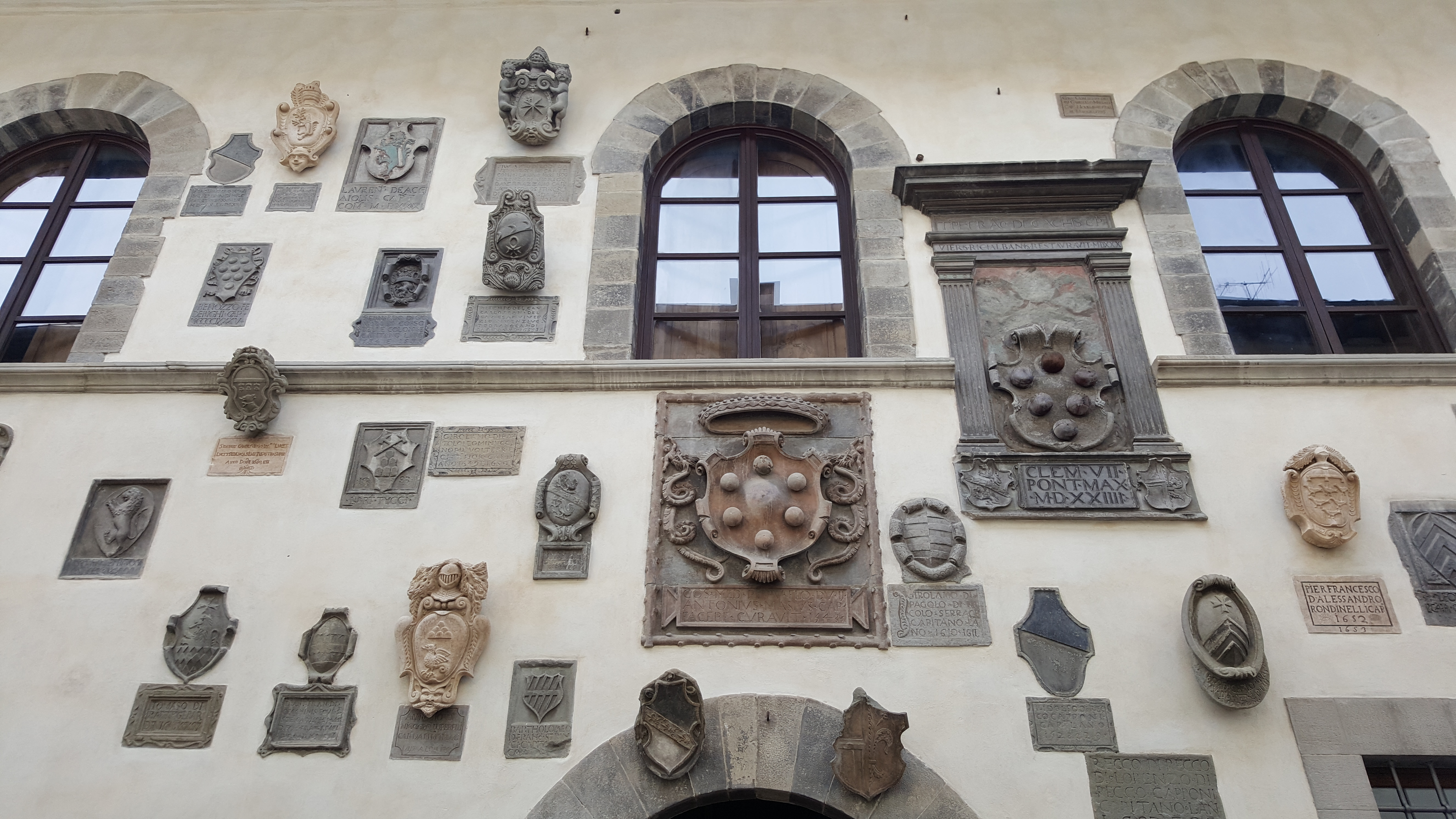 Palazzo del Capitano This is a photo of a monument which is part of cultural heritage of Italy.